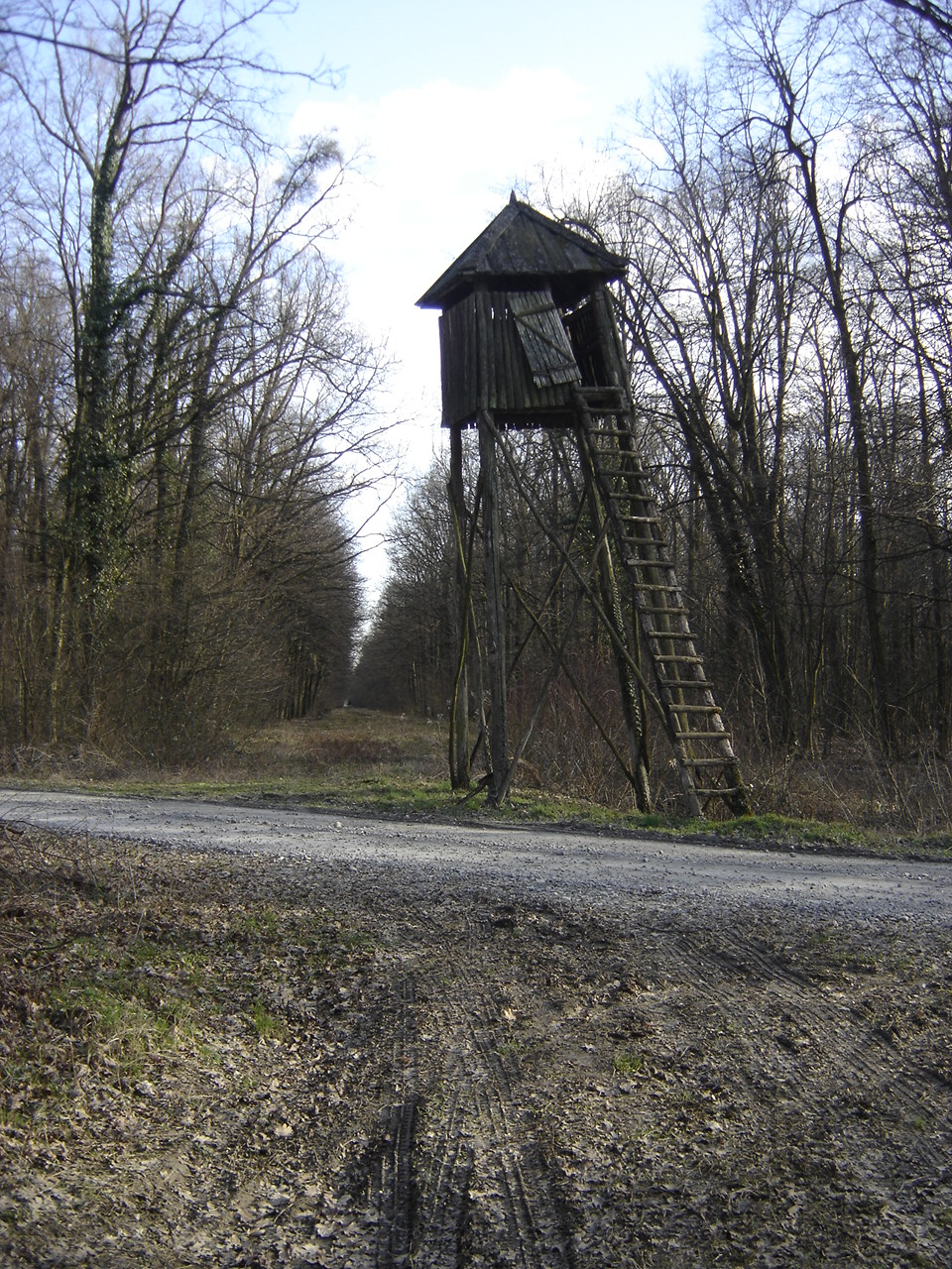 Čeka, šuma Haljevo kod Belog Manastira